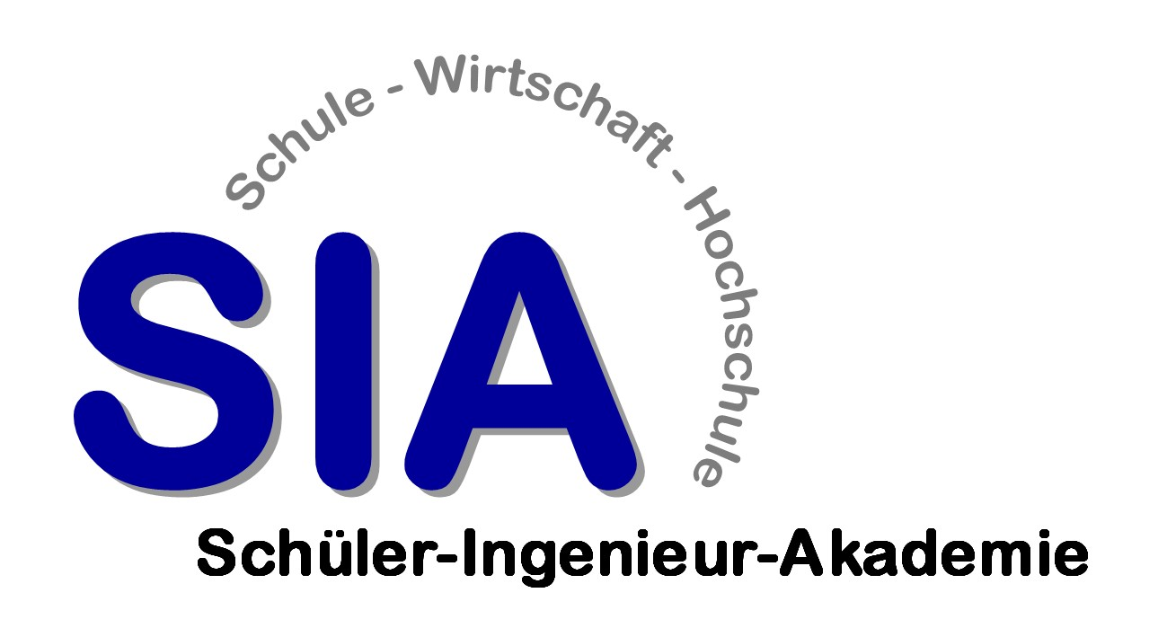 Das allgemeine Logo der SIA